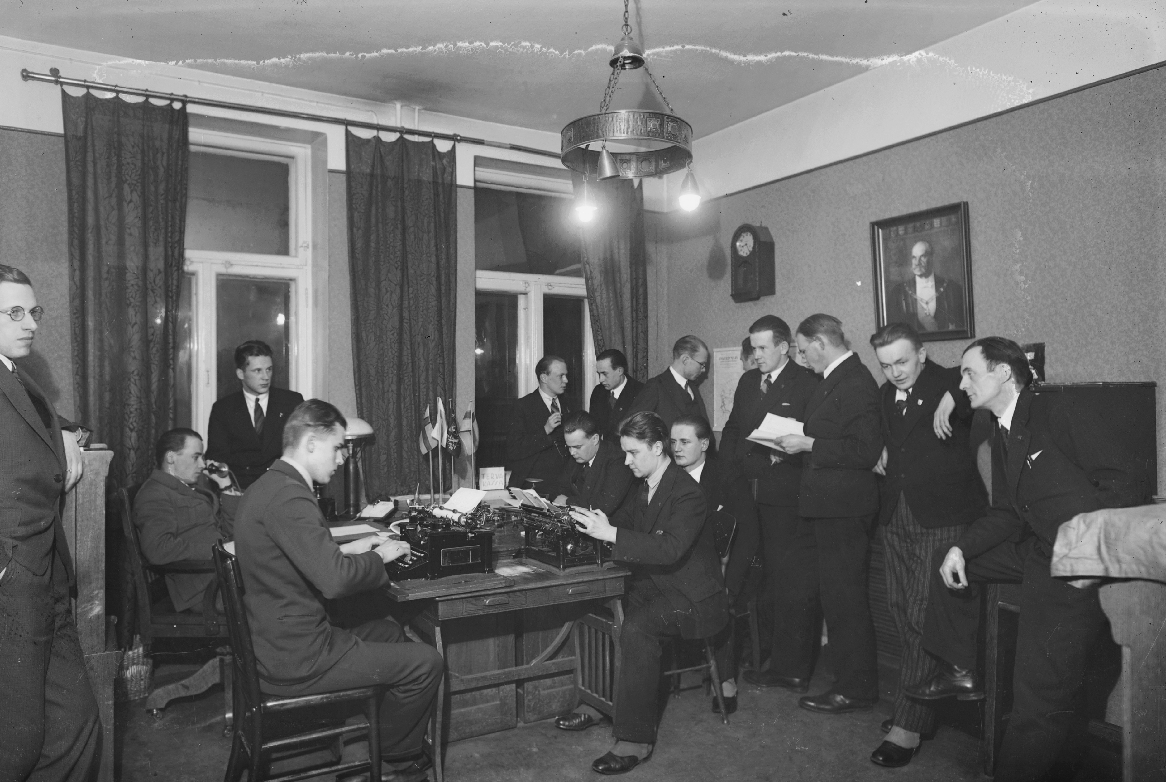 Akateemisen Karjala-Seuran kokous vuonna 1932. Oikealta Yrjö Vuorjoki, V.J.Sukselainen,?, Schröder. Pöydän ääressä vasemmalla Tapani Virkkunen, takana vasemmalla seisoo Tatu Malmivaara.